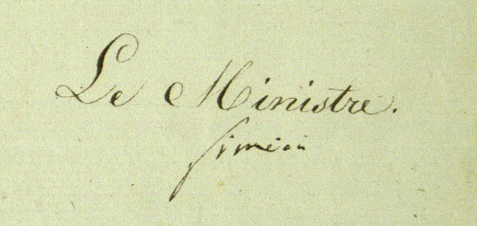 Unterschrift Joseph Jérôme Siméons als Justizminister des Königreichs Westphalen. Lagerort des Originals: Hessisches Staatsarchiv Marburg, Königreich Westphalen, Bestand 76a (Präfektur), Nr. 204. Publikationserlaubnis durch das Staatsarchiv Marburg am 11.06.2013 schriftl. erteilt.